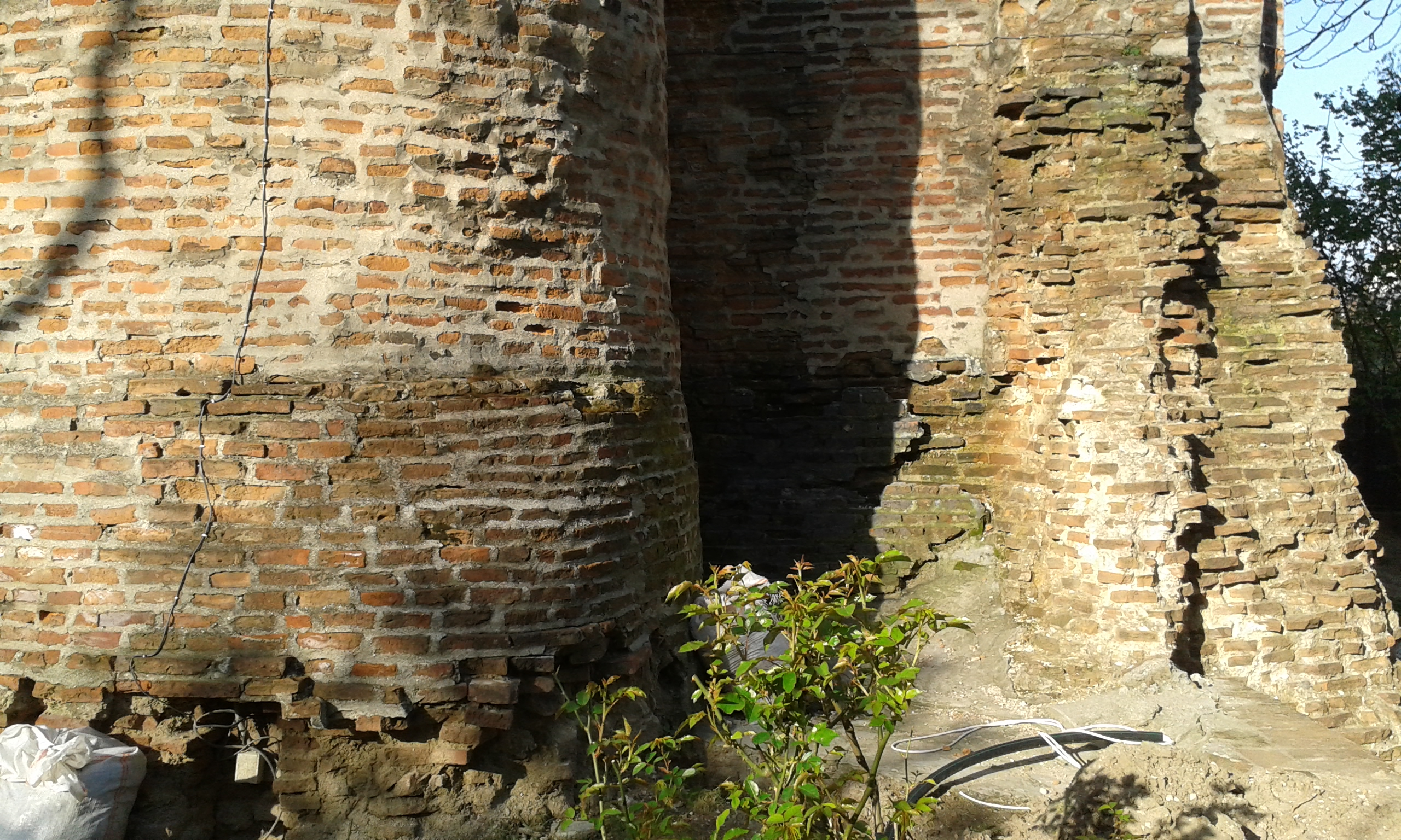 Case domnești-ruine 02